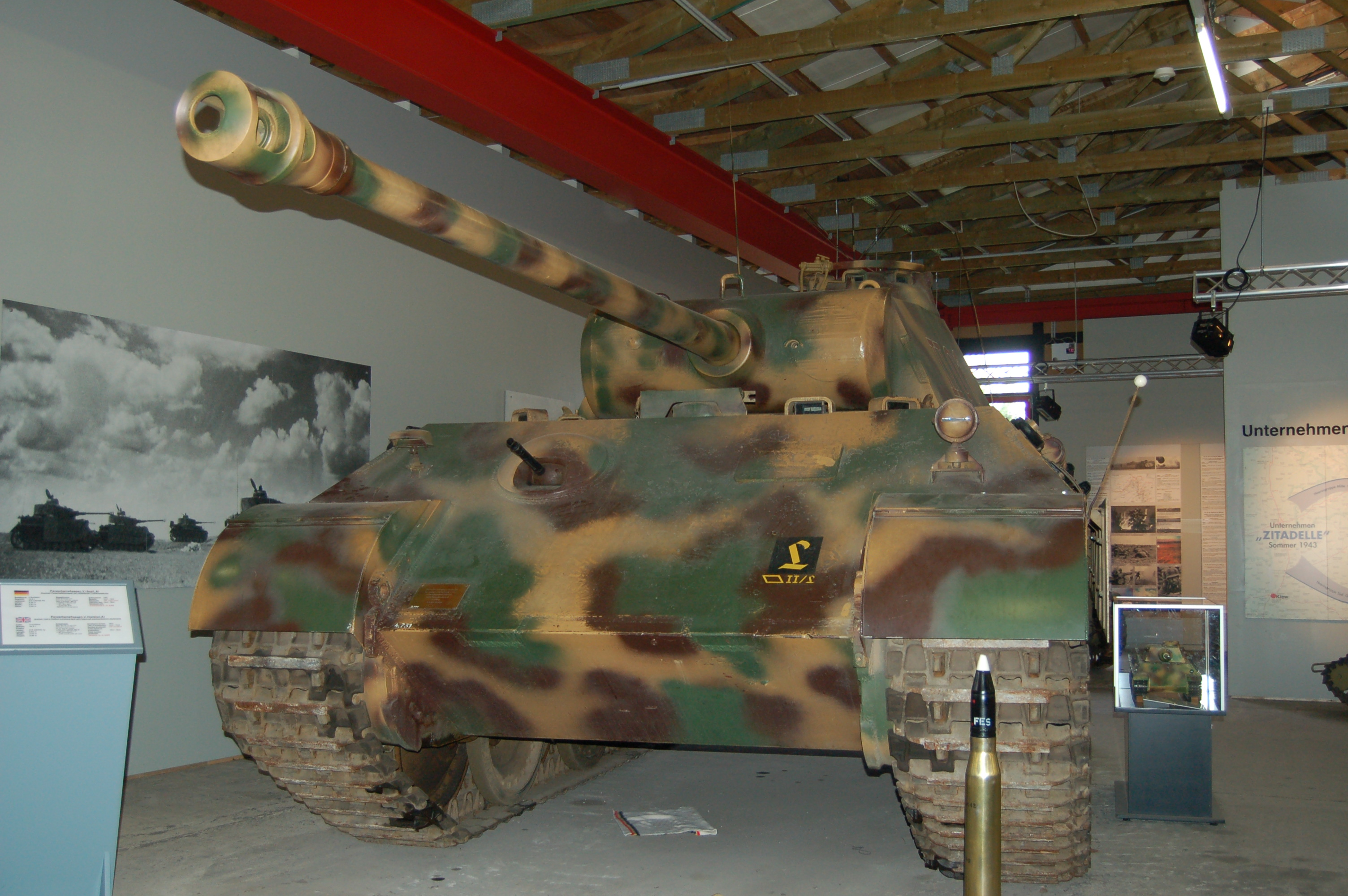 Panzerkampfwagen V (Ausf. A) Besatzung: 5 Soldaten Gewicht: 44,5 Tonnen Motorleistung: 515 kW (700PS) Bewaffnung: KwK 42 7,5 cm L/70 Patronen: 64 PzGr u. SprGr sowie Bug-u. Koaxial MG 34 Kaliber: 7,92 mm x 57 Baujahr: 1943 - 1945 Stückzahl: 329